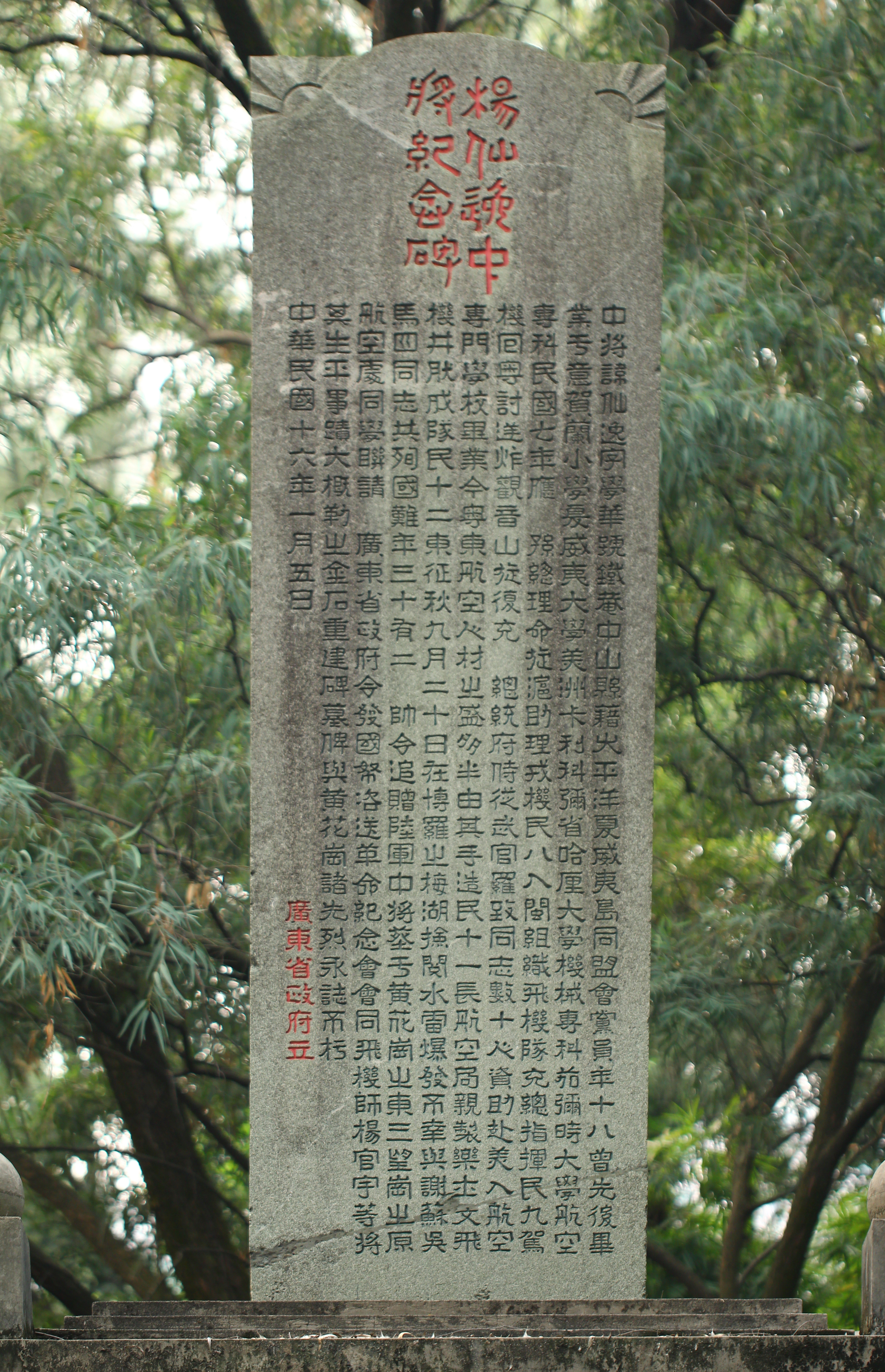 碑文： 中將諱仙逸字學華號鐵菴中山縣籍太平洋夏威夷同盟會黨員年十八曾先後畢業於意賀蘭小學夏威夷大學美洲卡利科彌省哈厘大學機械專科茄彌時大學航空科民國七年應孫總理命旋滬助理戎機民八入閩組織飛機隊充總指揮民九駕機回粵討逆炸觀音山旋復充總統府侍從武官羅致同志數十人資助赴美入航空專門學校畢業今粵東航空人材之盛多半由其手造民十一長航空局親制製樂士文飛機井肰成隊民十二東征秋九月二十日在博羅之梅湖檢閱水雷爆發不幸與謝蘇吳馬四同志共殉國難年三十有二帥令追贈陸軍中將葬於黃花崗之東三望崗之原航空處同學聯請廣東省政府令發國帑咨送革命紀念會會同飛機師楊官宇等將其生平事蹟大概勒之金石重建碑墓俾與黃花崗諸先烈永誌不朽 中華民國十六年一月十五日 廣東省政府立